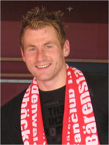 Lukas Sinkiewicz, deutscher Fussballspieler